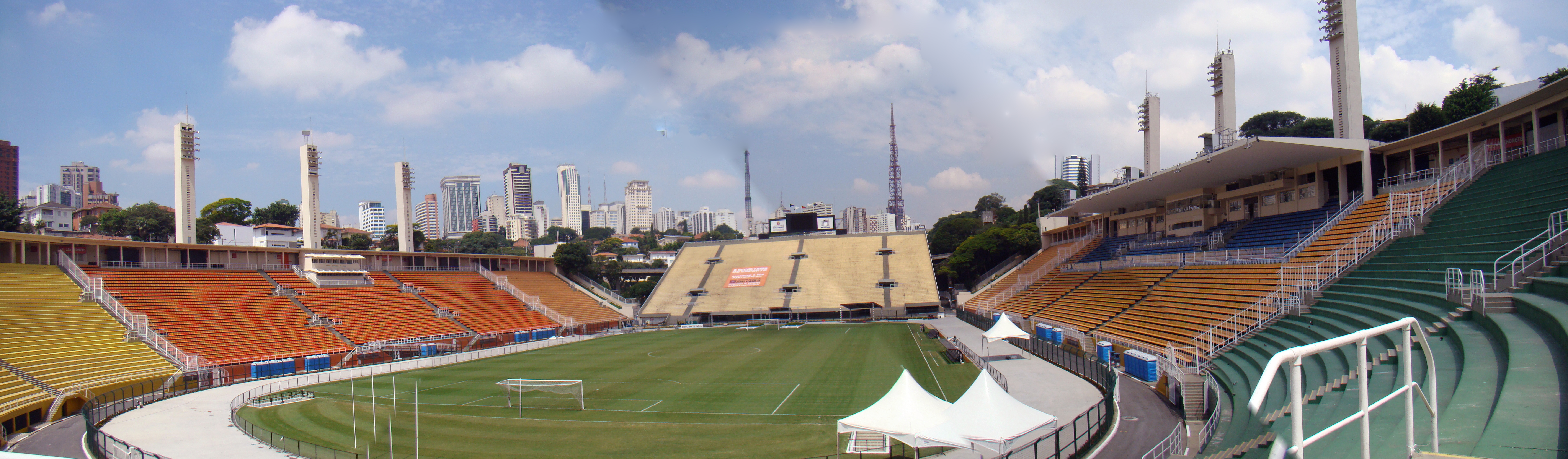 Panorama do Estádio do Pacaembu em São Paulo, Brasil.